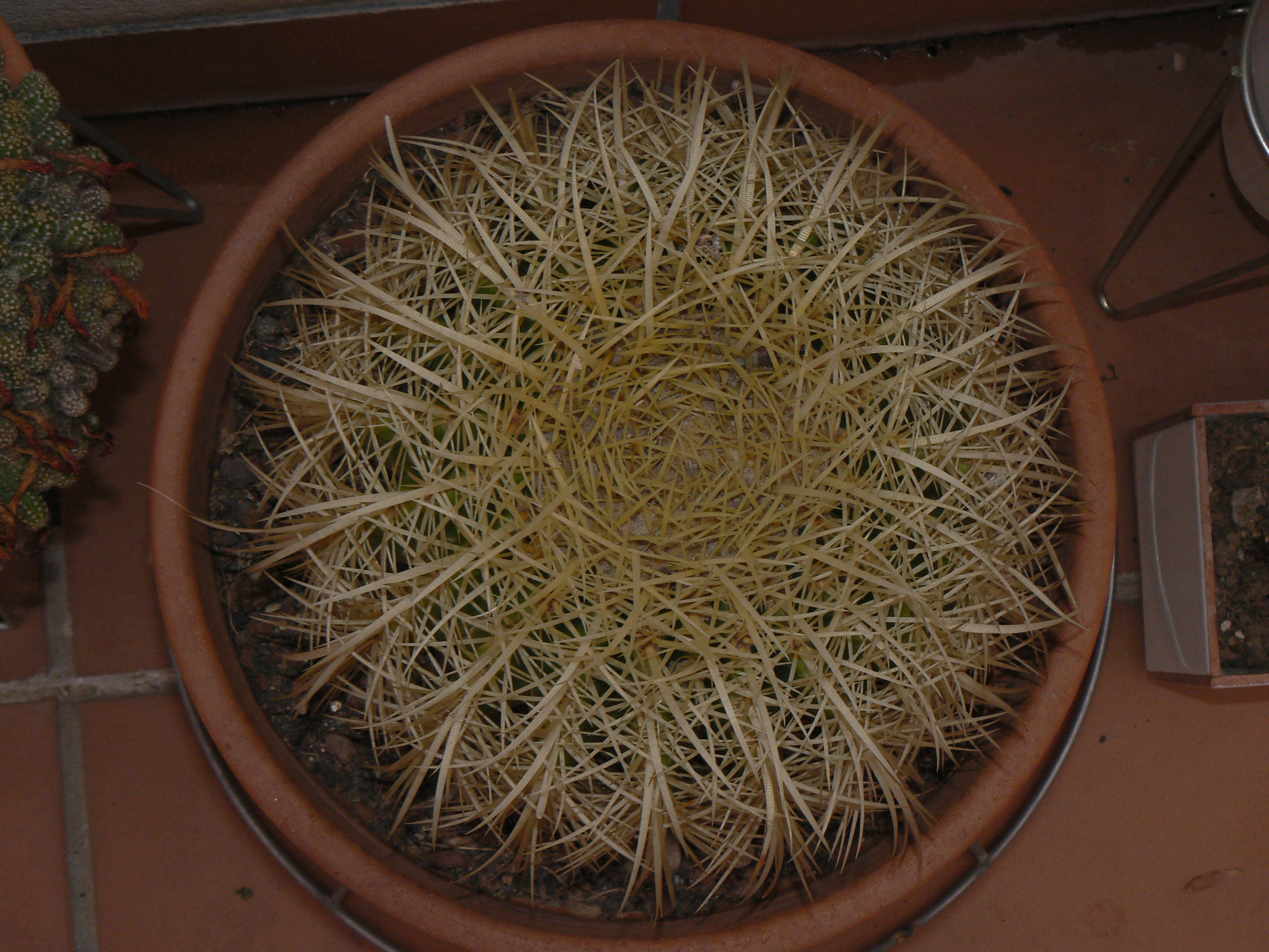 Equinocactus grusonii